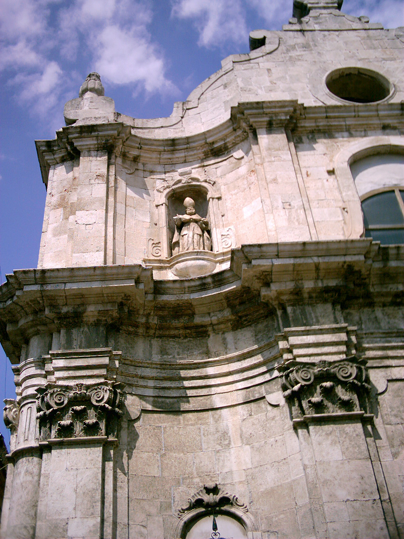 San Severo, particolare della facciata del santuario della Beata Vergine del Soccorso, detta anche di Sant'Agostino (XVIII secolo).